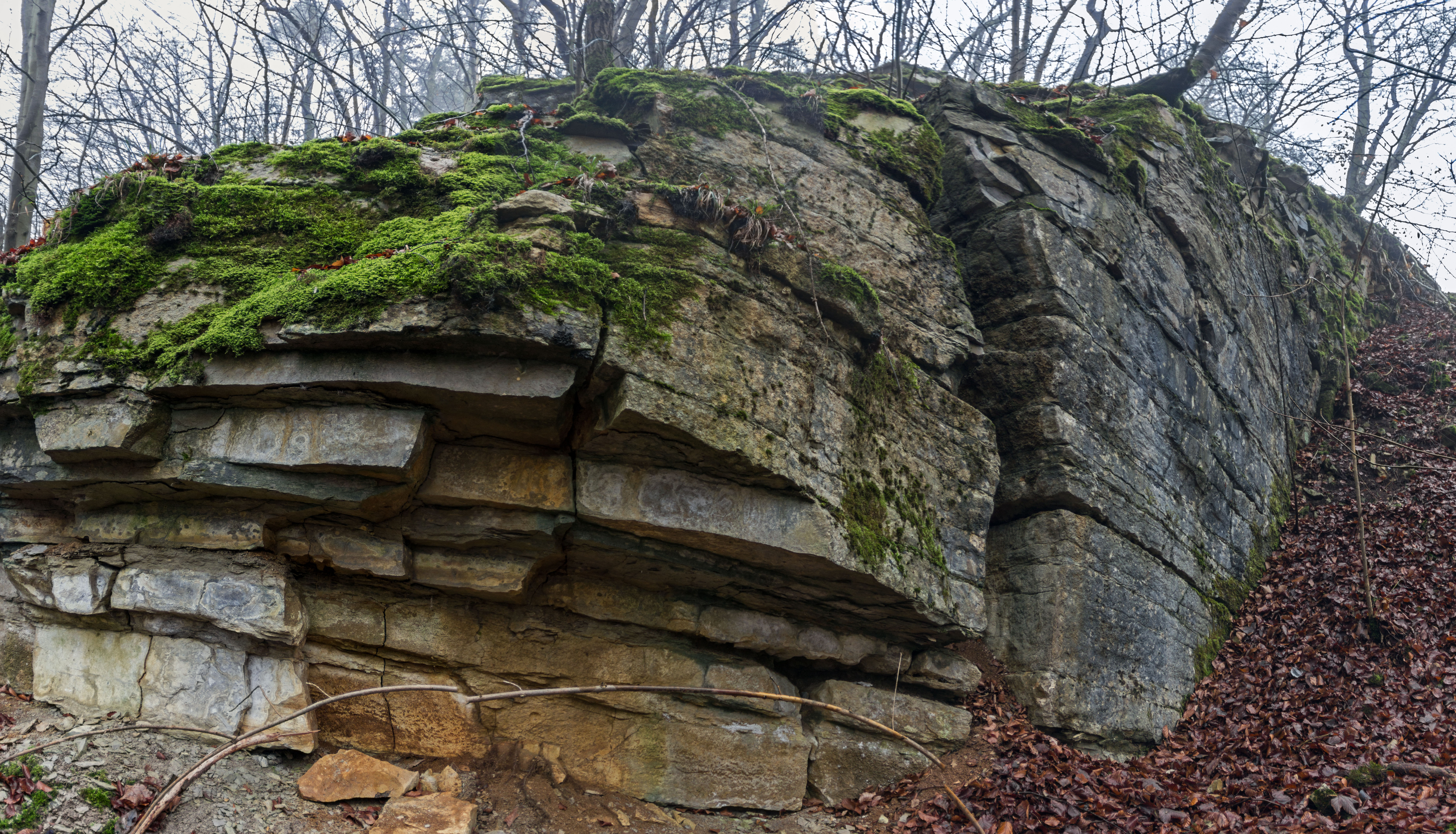 Steinbruch, Kalkstein, Unterrieden, Geotop